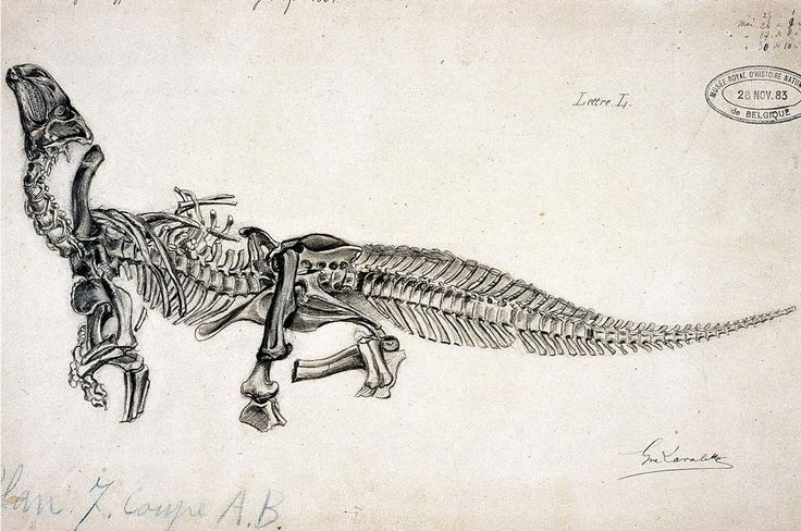 Tekening door Gustave Lavalette (juli 1882). Vele skeletten van Iguanodon bernissartensis zijn bijna volledig. Dit wijst erop dat de dieren na hun dood snel in de sedimenten van het paleomeer van Bernissart ingesloten werden en dus afgesloten werden van externe destructieve factoren zoals predatie.